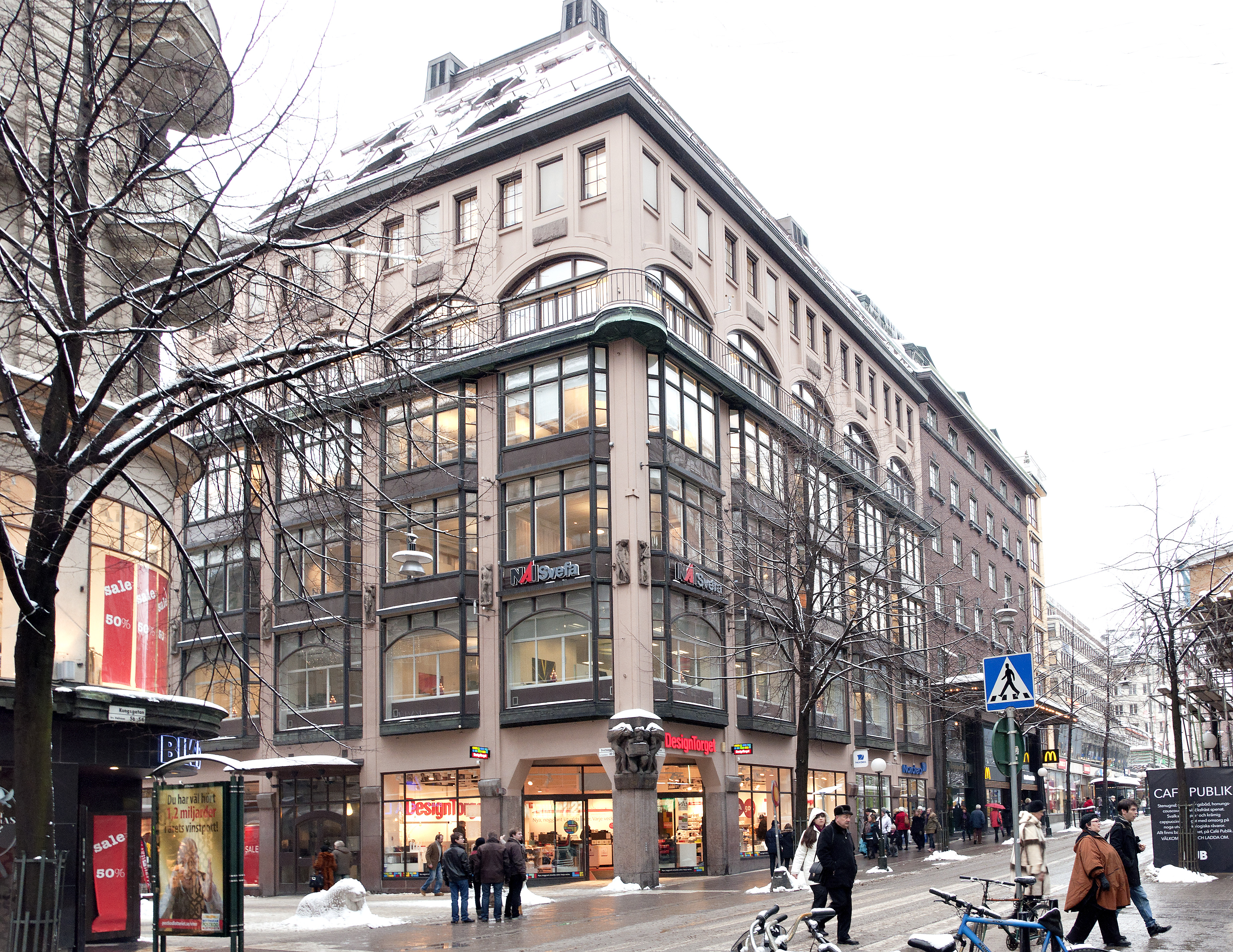 Kungsgatan 52, Drottninggatan 78. Byggnadsår 1913-15, arkitekt Erik Josephson, byggherre Fastighets AB Filia , byggmästare G Hesselman.